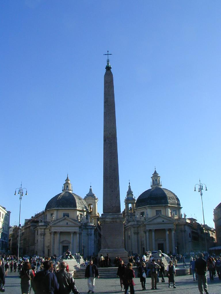 Roma, piazza del Popolo: santa Maria dei Miracoli e santa Maria in Montesanto.